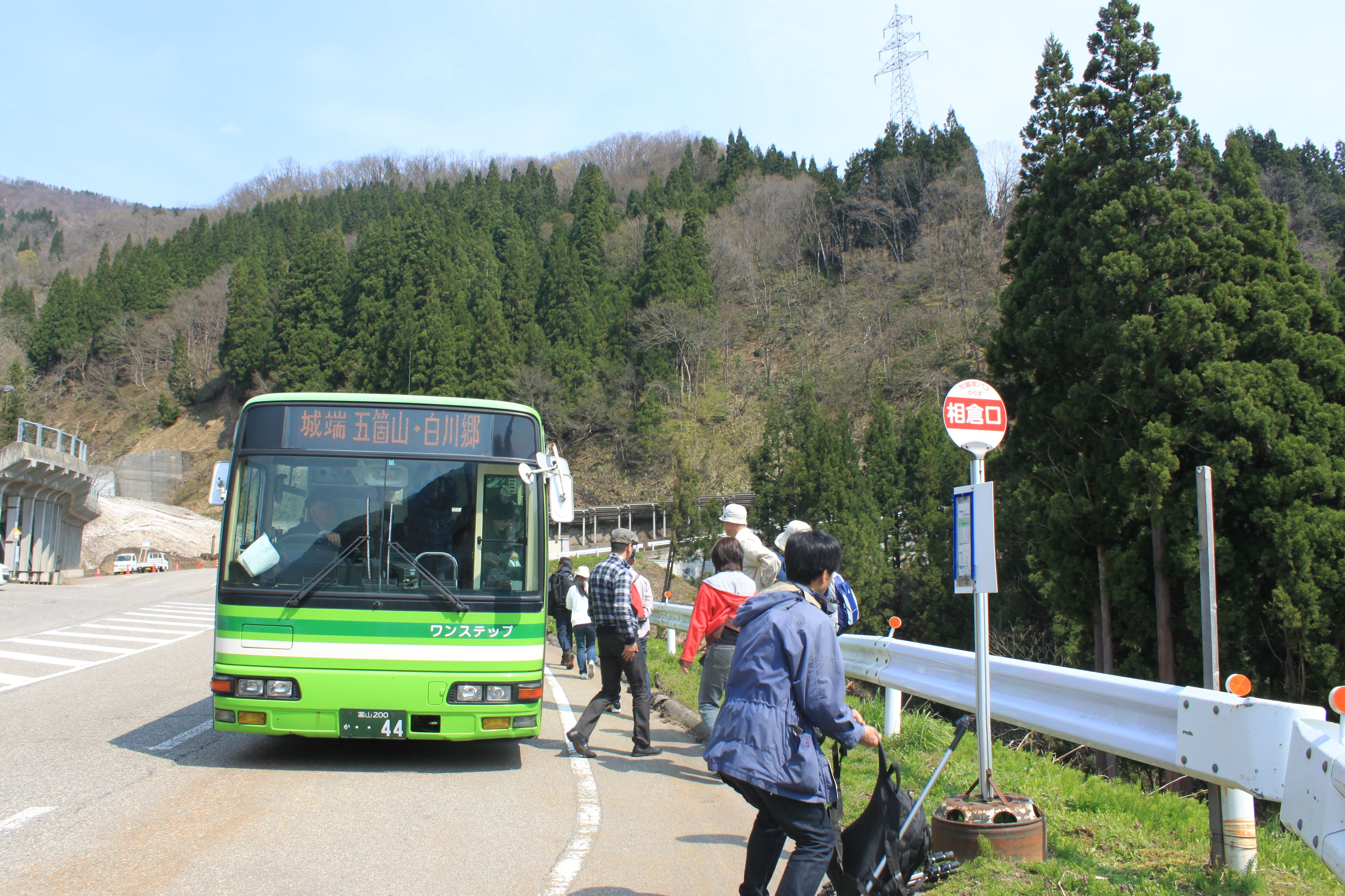 相倉口バス停